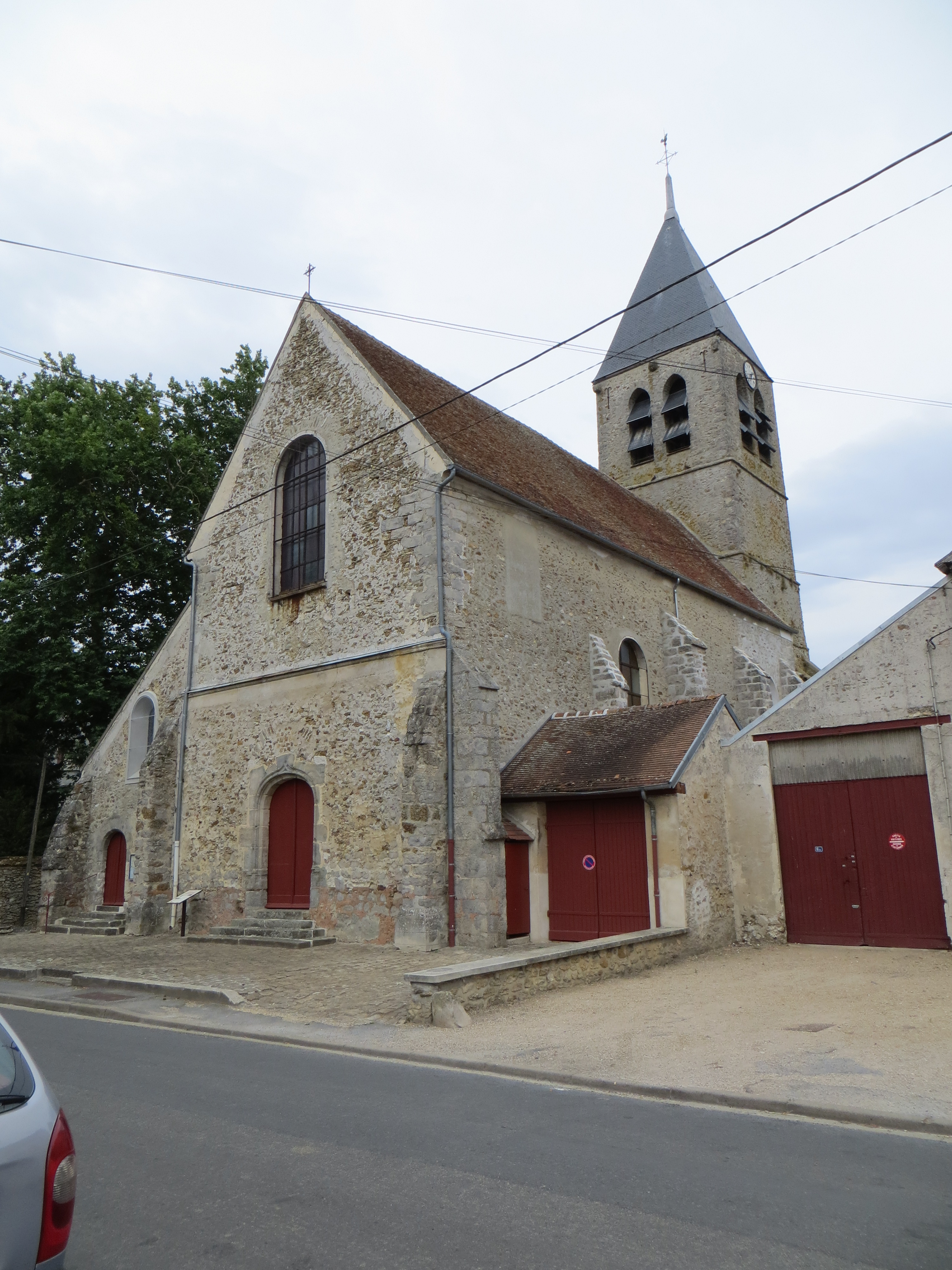 Église Saint-Étienne